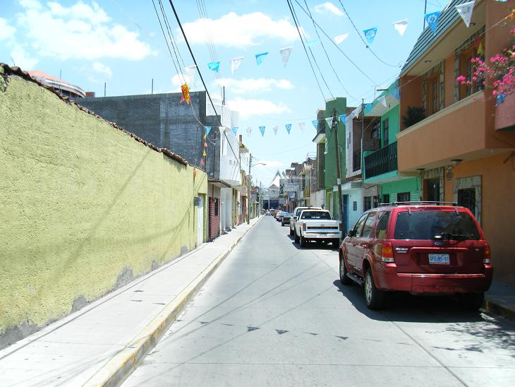 Calle Pípila en la colonia Centro de Uriangato